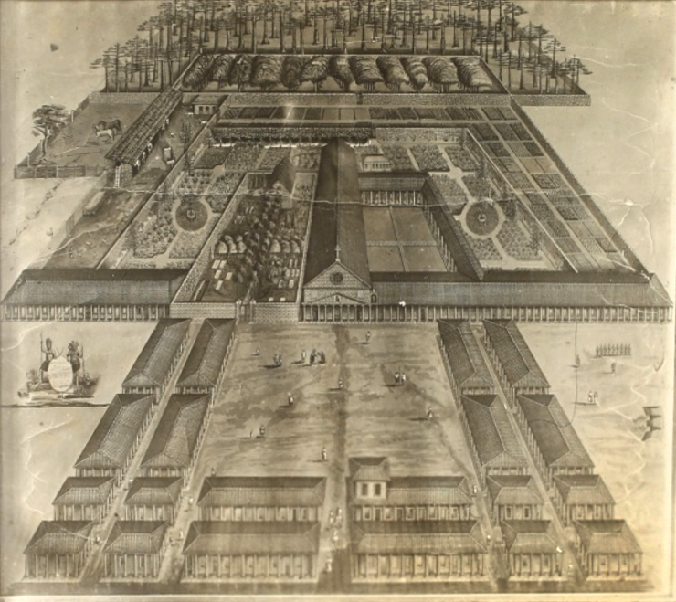 O Povoado de São João Batista